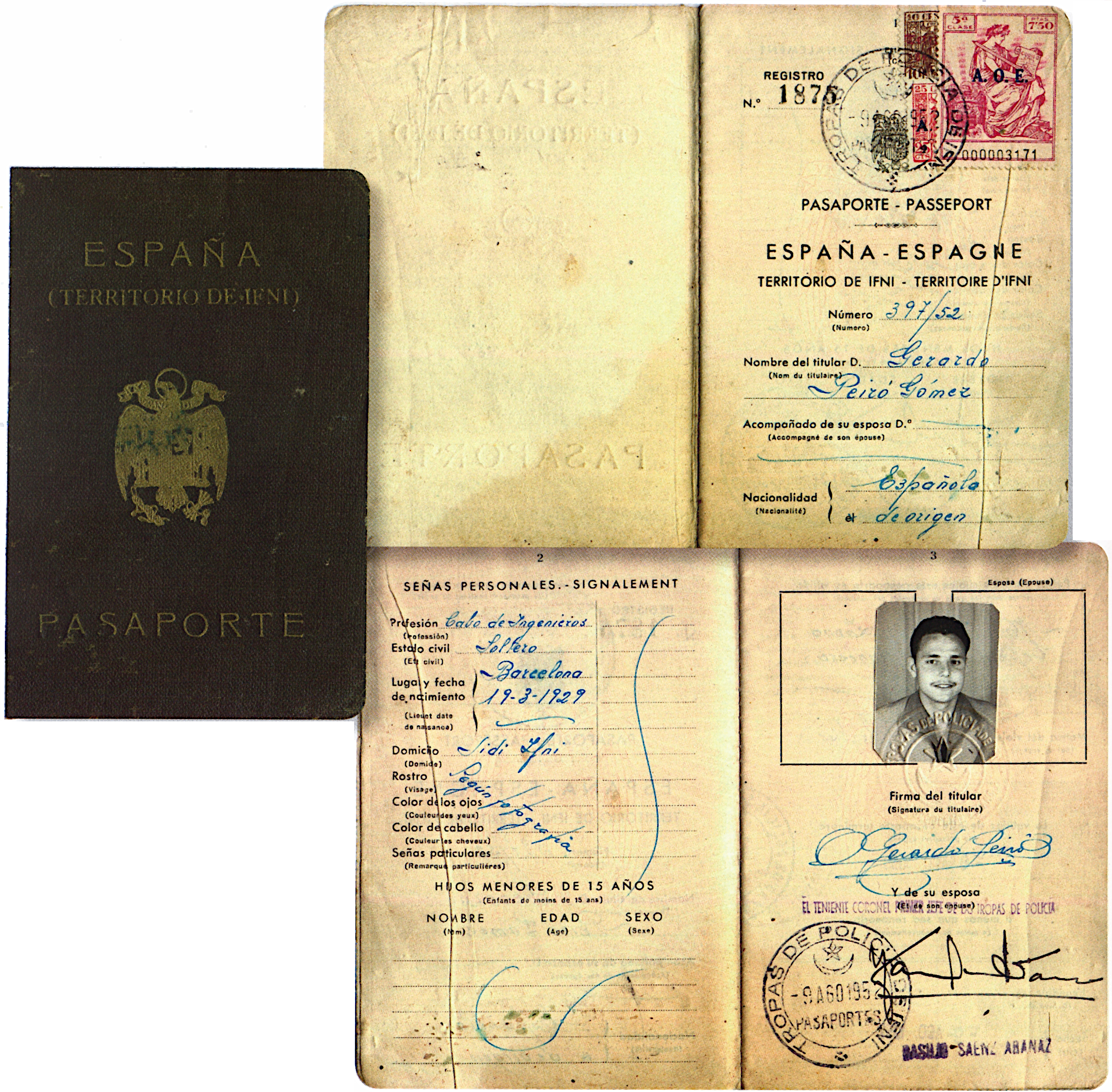 Spanischer Reisepass, ausgestellt in Ifni, einer kolonialen Besitzung in Nordafrika.